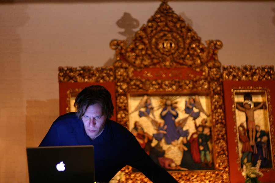 Fennesz